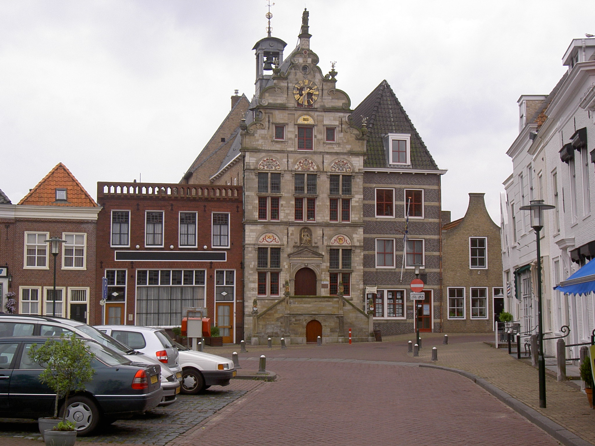 Raadhuis Brouwershaven met huizen eromheen